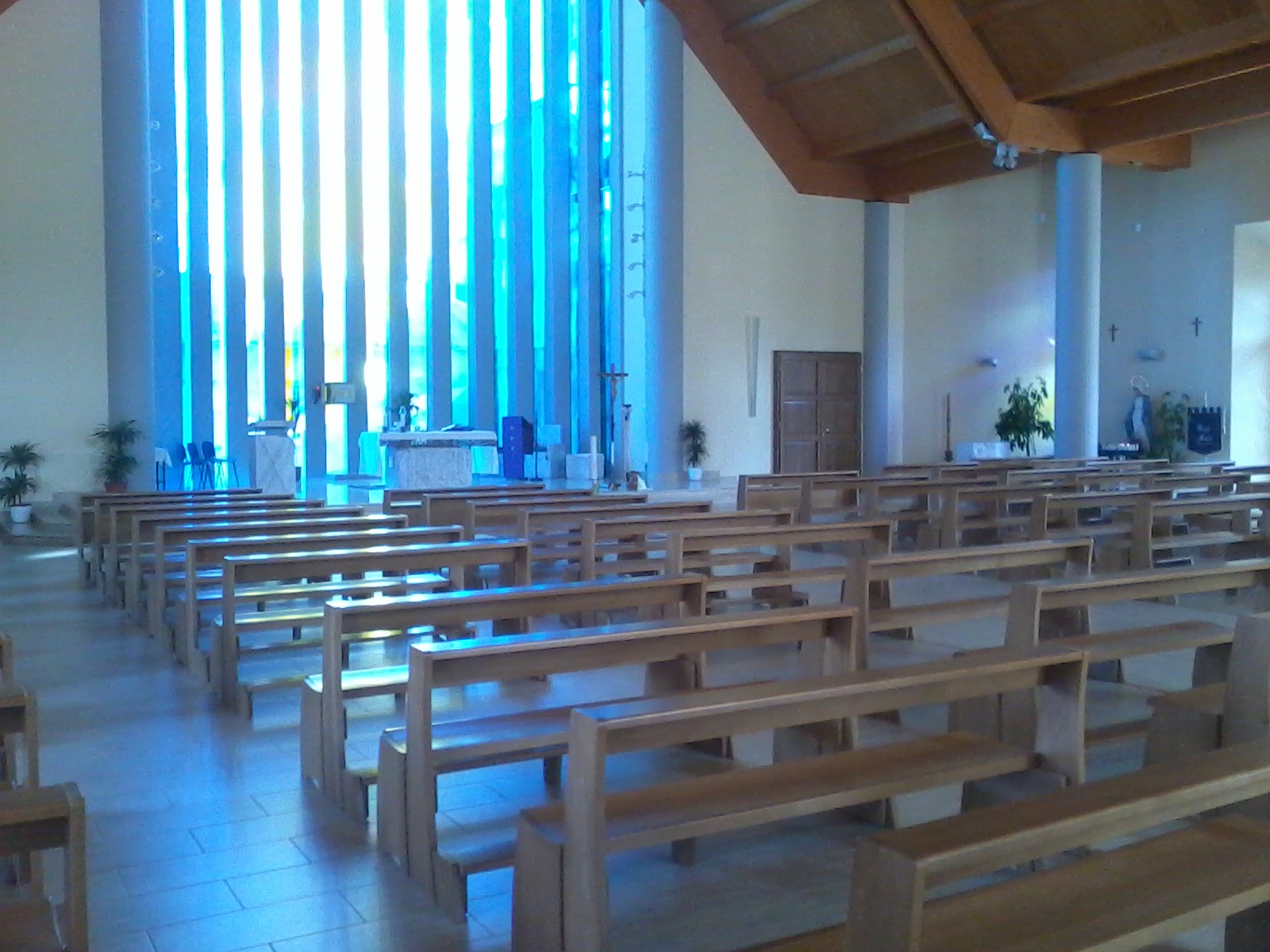 L'interno della chiesa di San Valentino a Cisterna di Latina